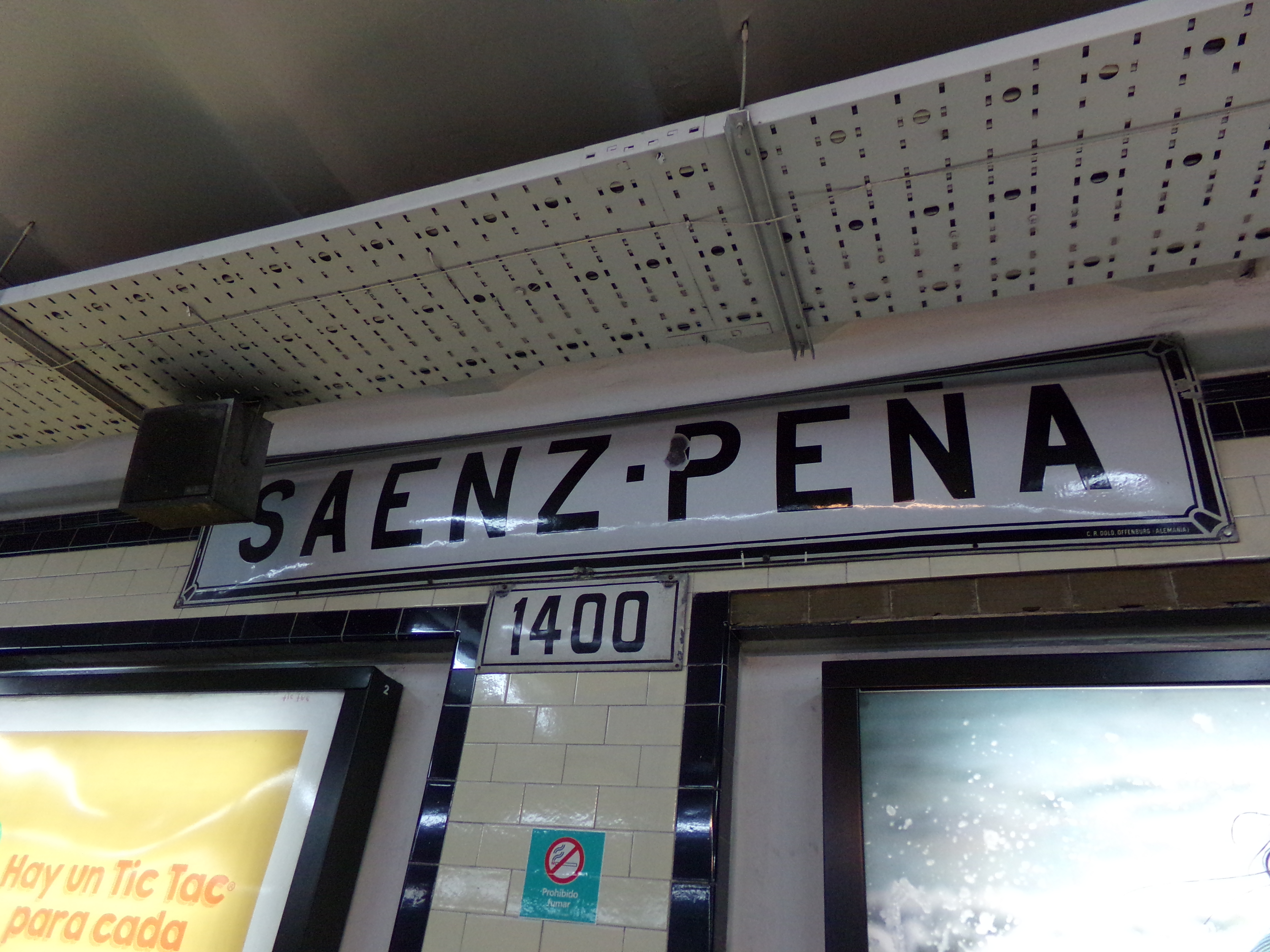 Sáenz Peña, línea A, Subte de Buenos Aires